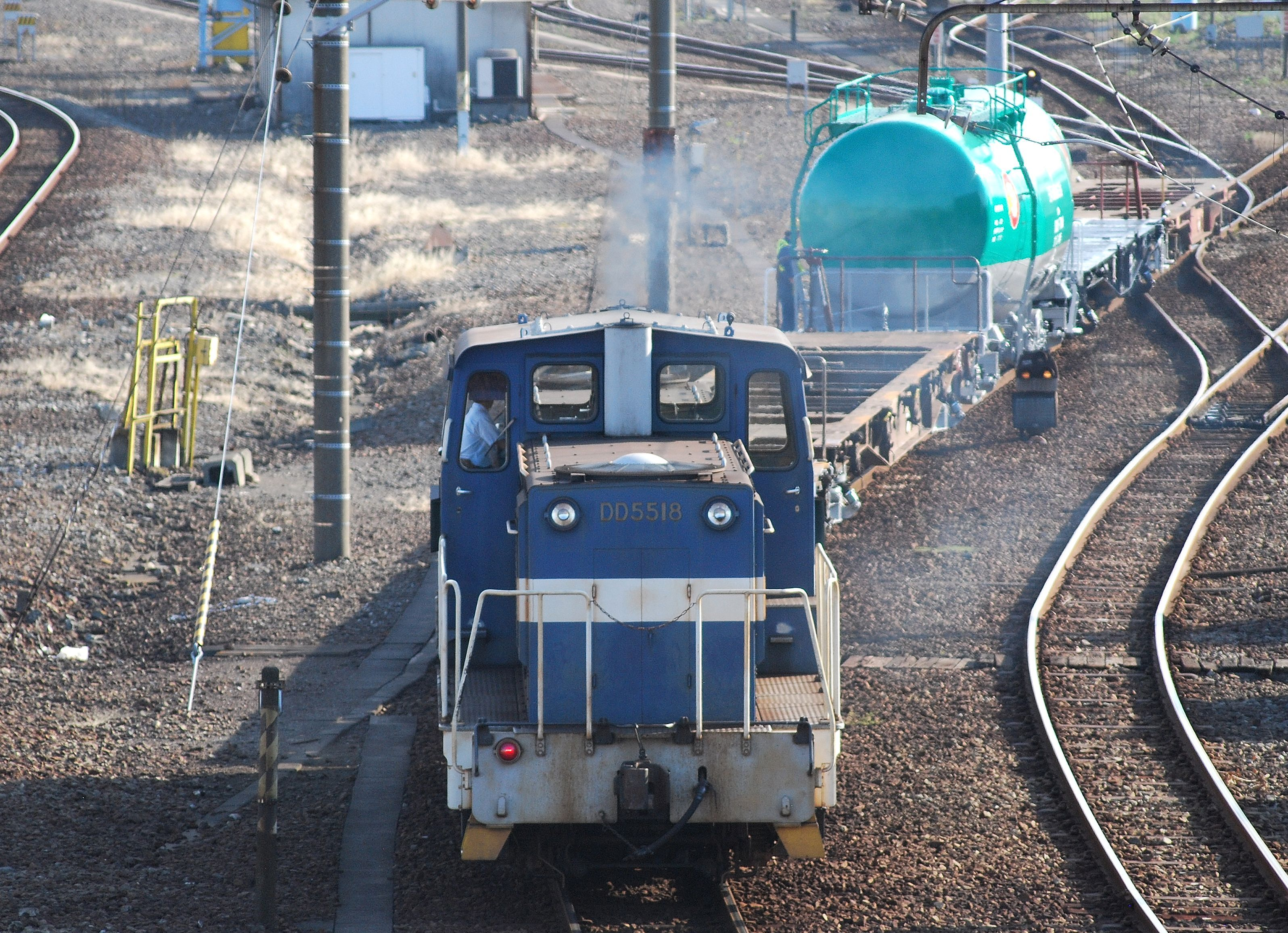 川崎貨物駅で貨物の入換えを行う神奈川臨海鉄道のDD55 18ディーゼル機関車（駅に跨る陸橋から望遠レンズで撮影）